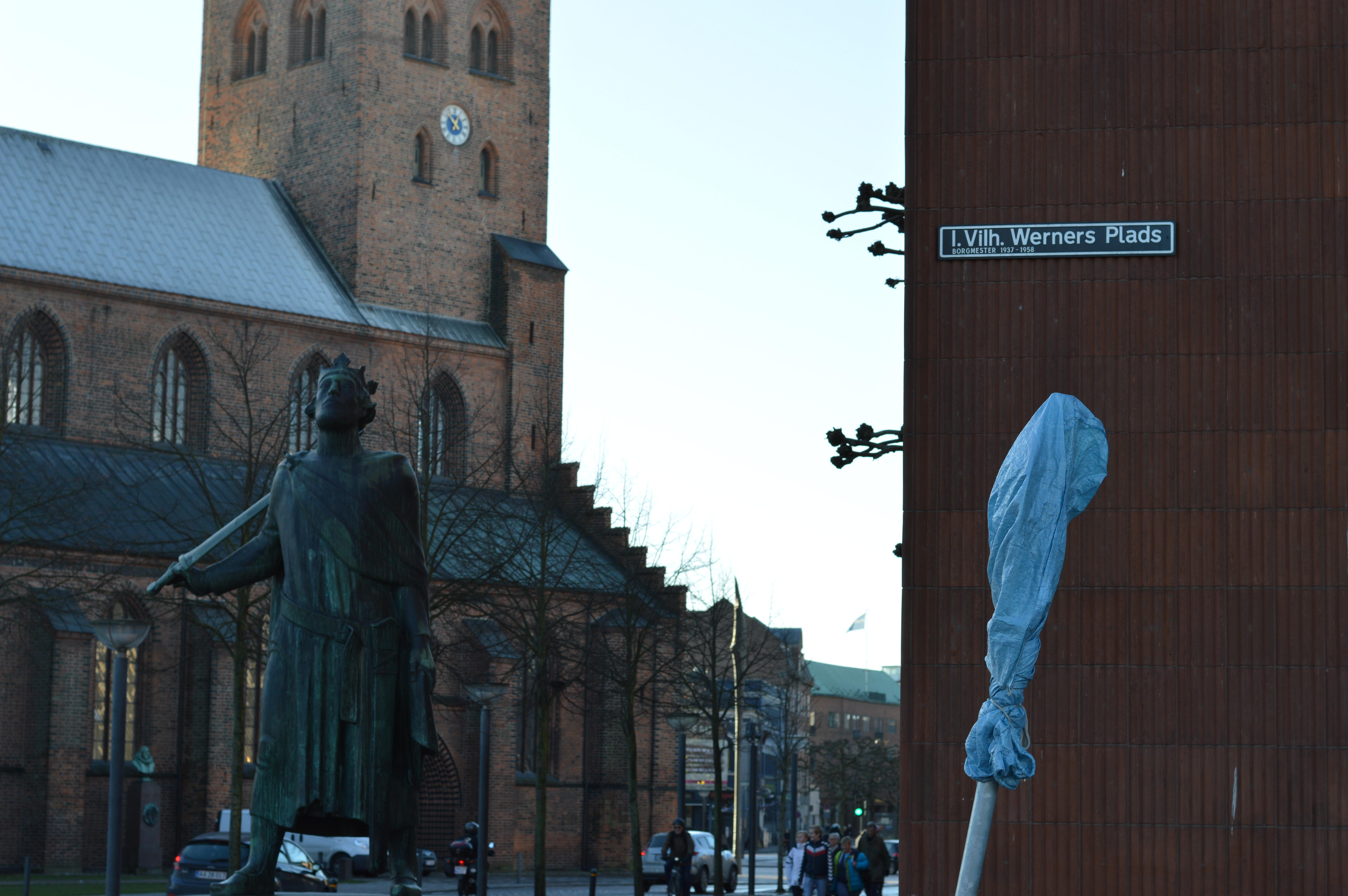 Statue af Knud den Hellige på I. Vilh. werners Plads bag Odense Rådhus